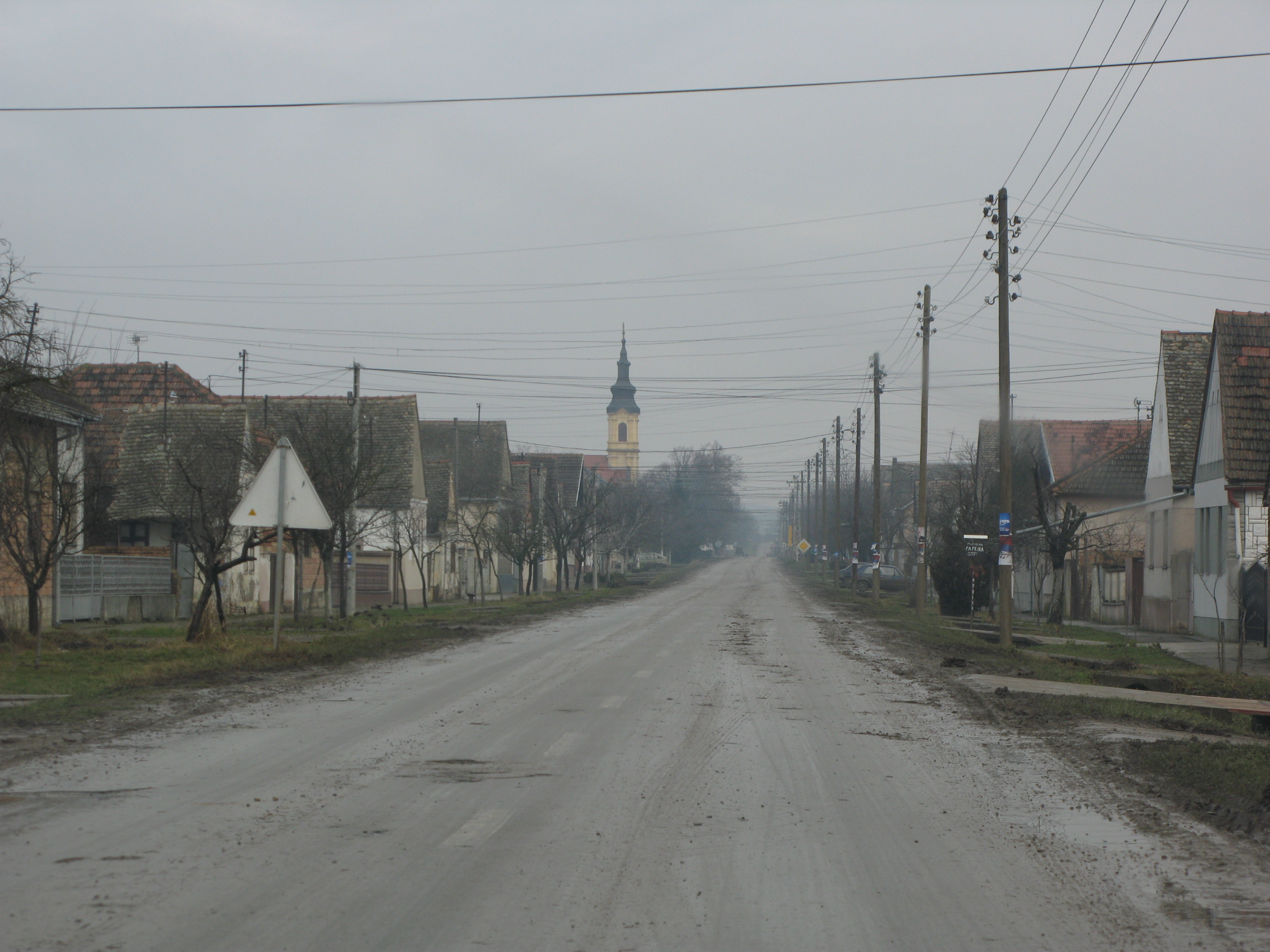 Main street in Erdevik, Serbia, Vojvodina/Rue principale d'Erdevik, Serbie, Voïvodine